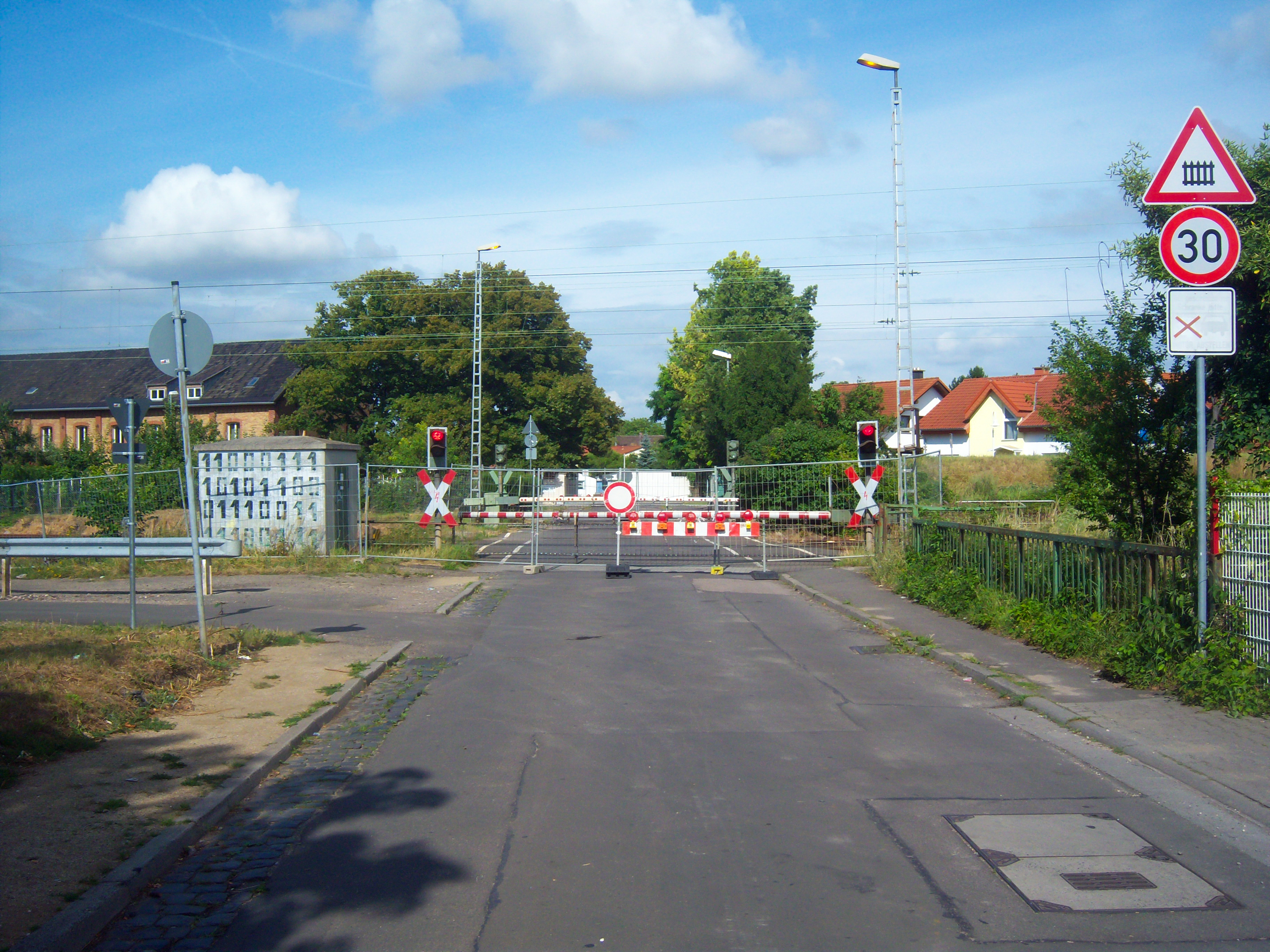 Wegen Bauarbeiten im Gleisbett des Bahnhofs Osthofen vorübergehend außer Betrieb genommener Bahnübergang des Ziegelhüttenweges in Osthofen